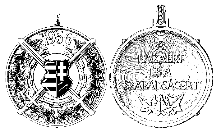 Erinnerungsmedaille des ungarischen Volksaufstandes (amtliches Werk)